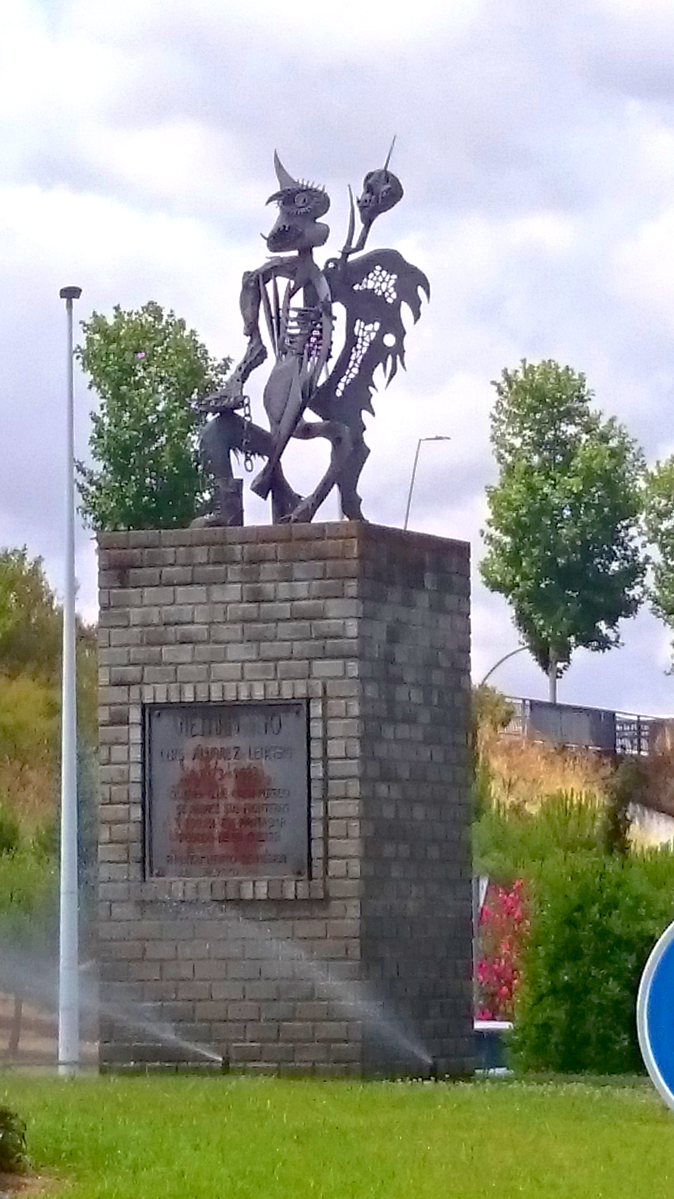 Mérida (Badajoz). Vietnam, 1970. Vista general de la obra colocada desde finales de 2002 en la confluencia de la Avda. Eugenio Hermoso y el Paseo Rosales. Luis Álvarez Lencero (1923–1983) DescriptionSpanish poet, sculptor and painterDate of birth/death 9 August 1923 10 June 1983Location of birth/death Badajoz MéridaAuthority control : Q55435314 VIAF: 40827276 ISNI: 0000 0000 5948 9657 LCCN: n85263601 BNE: XX855085 WorldCat creator QS:P170,Q55435314